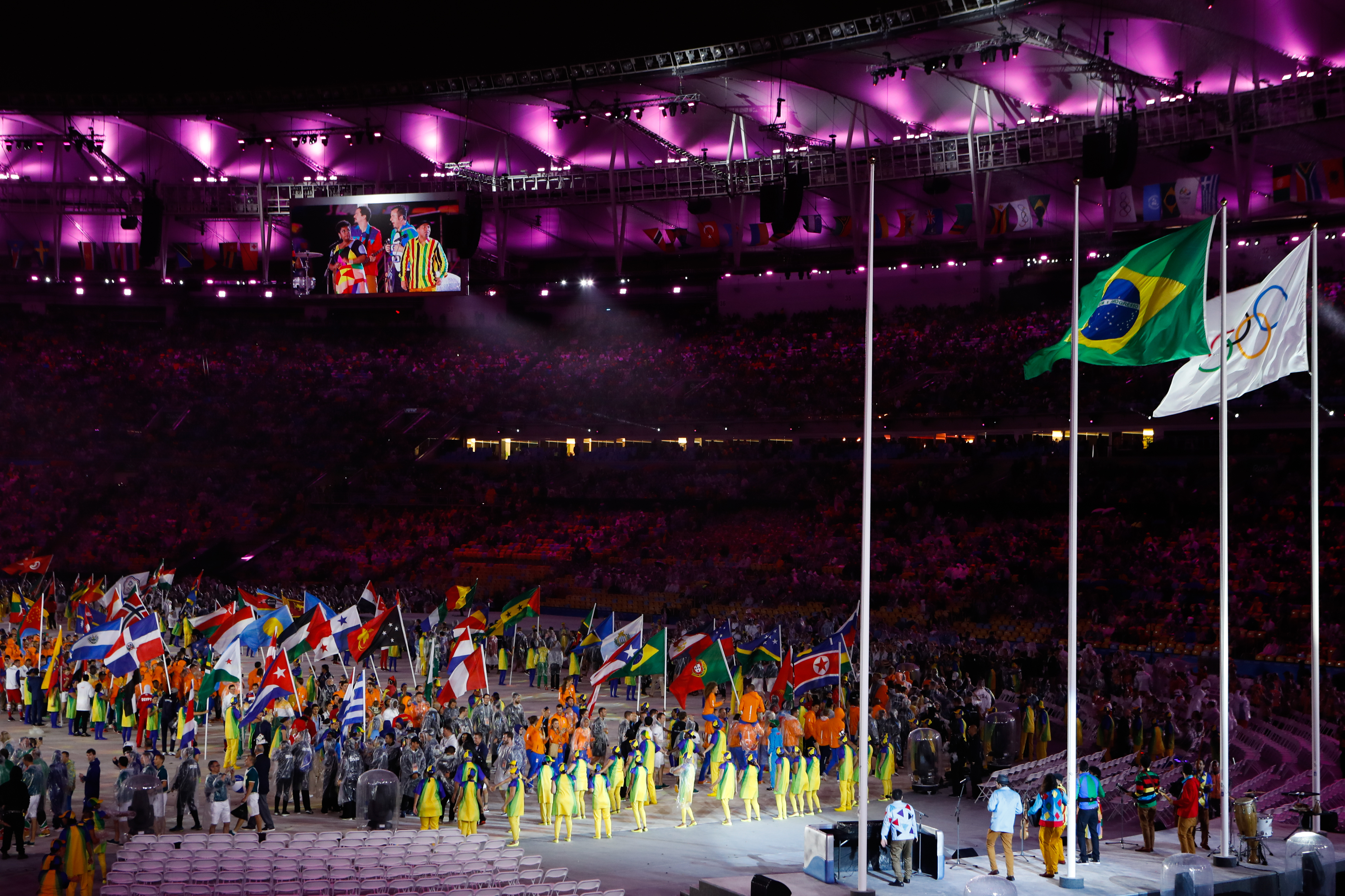 Rio de Janeiro - Cerimônia de encerramento dos Jogos Olímpicos Rio 2016, no Maracanã (Fernando Frazão/Agência Brasil)